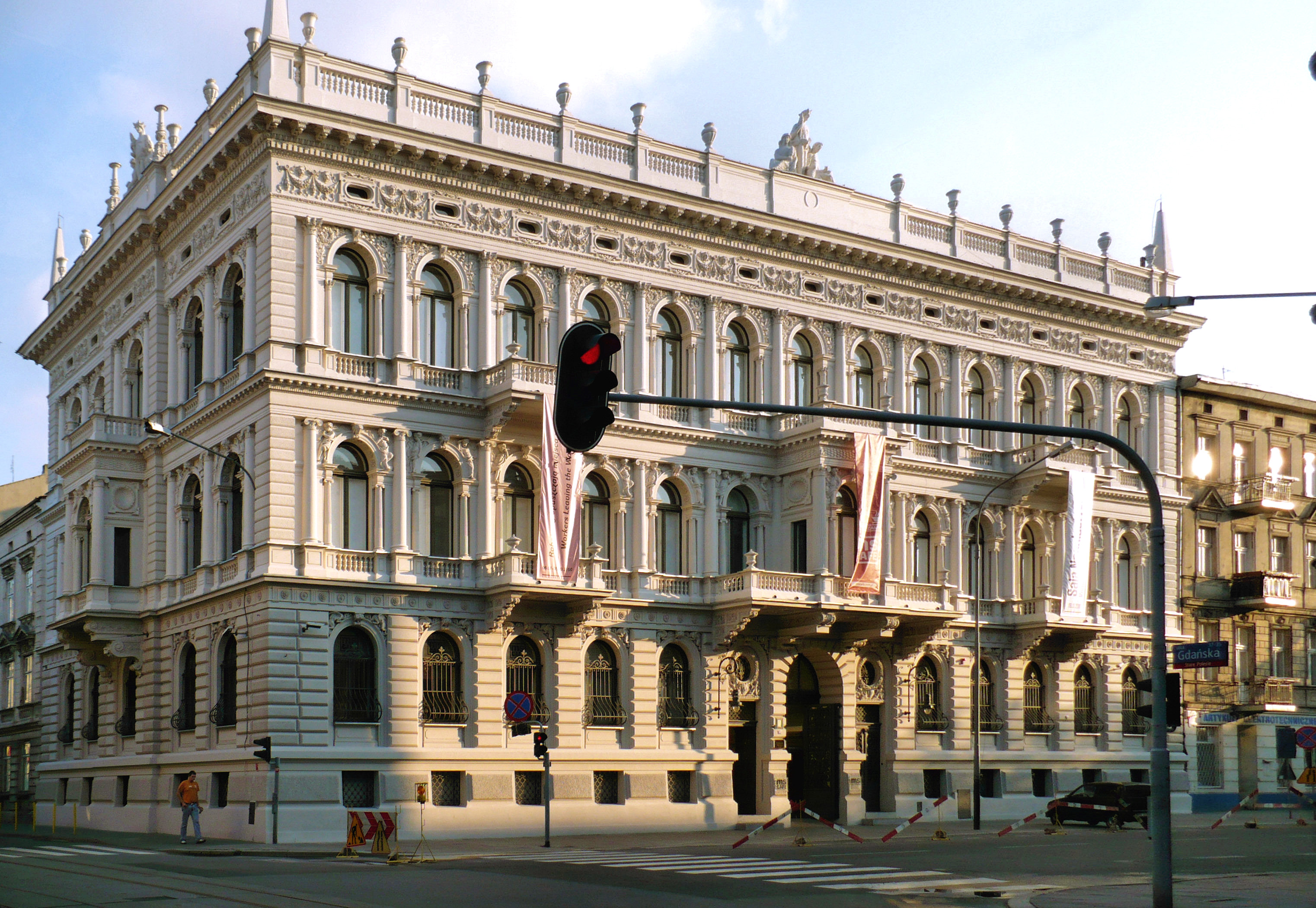 Pałac Maurycego Poznańskiego z 1896 r, obecnie muzeum sztuki